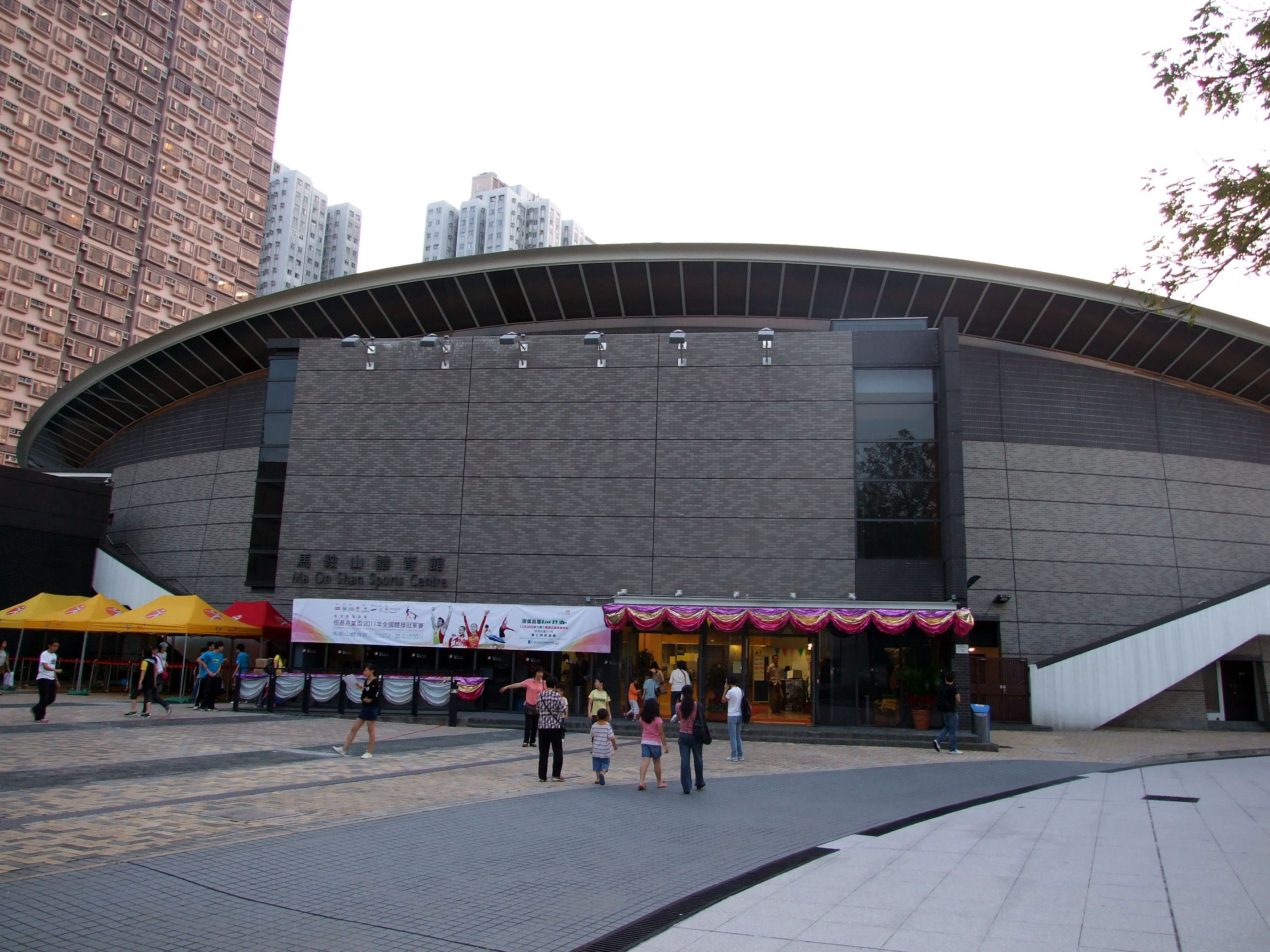 中文（香港）: 馬鞍山體育館